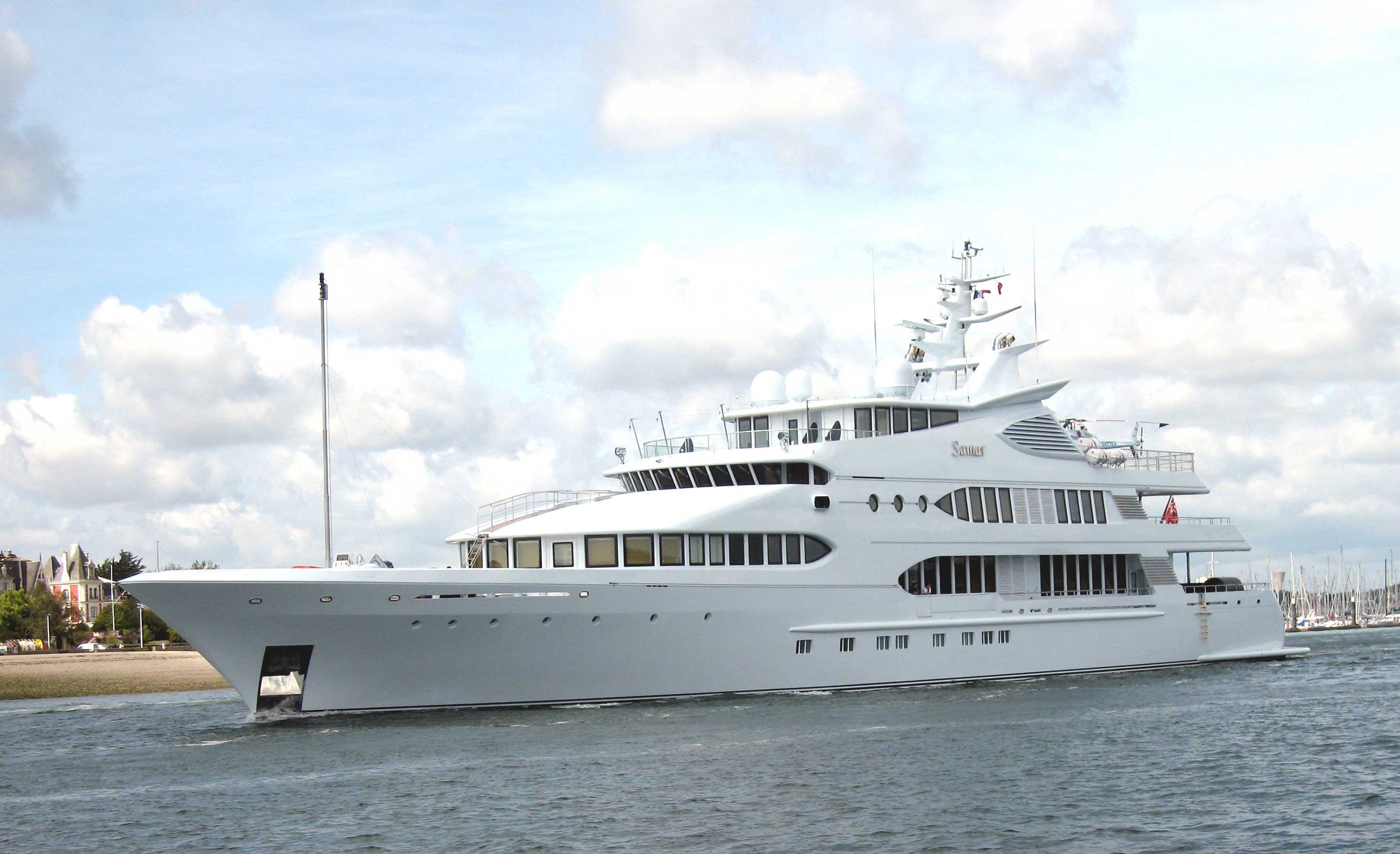 Description : Motor Yacht Samar Place : Lorient, Bretagne, France Date : Aout 2006 Auteur : Pline